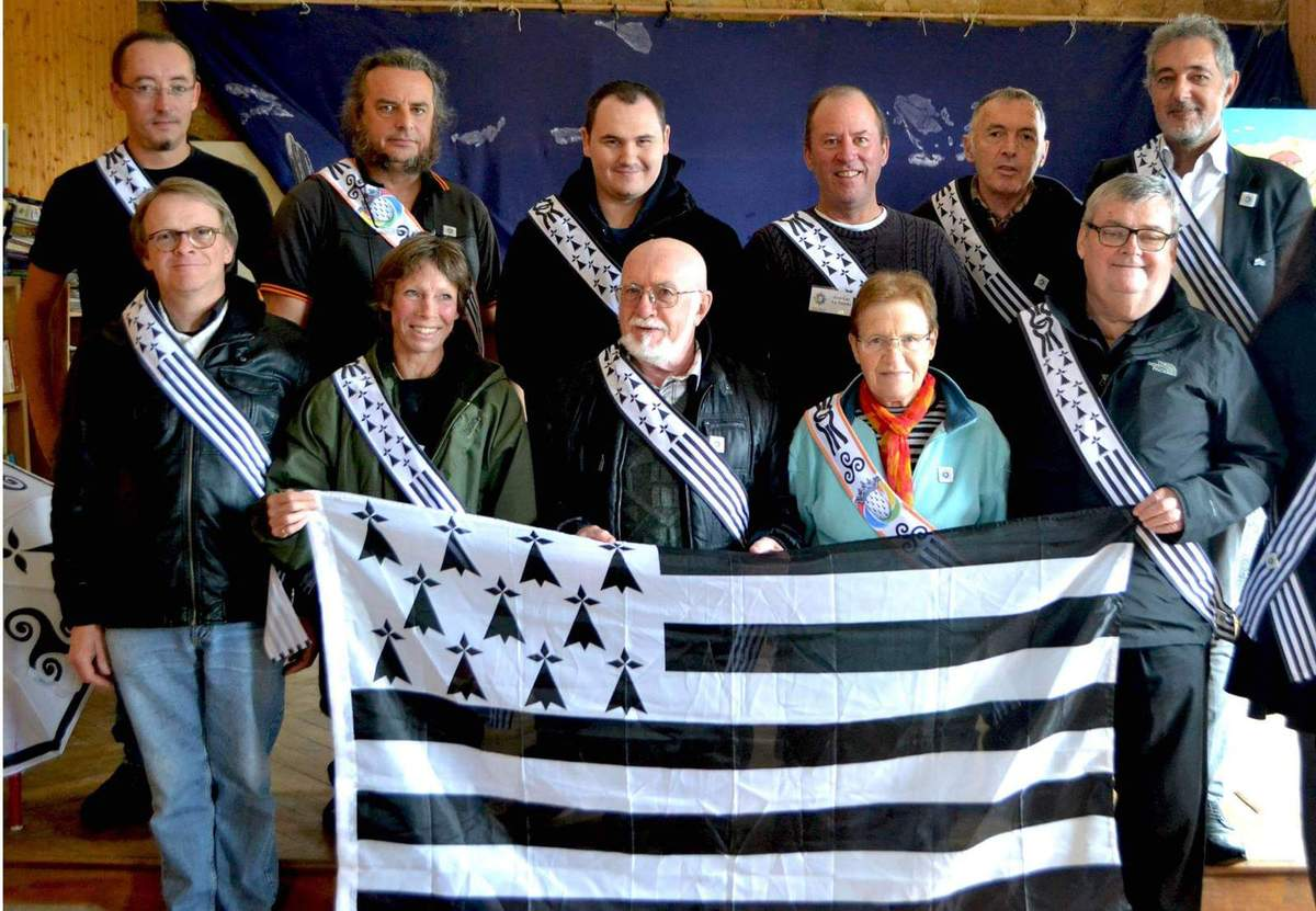 Un nebeut re eus an 33 parlamantour eus ar c'helchiad kentañ.